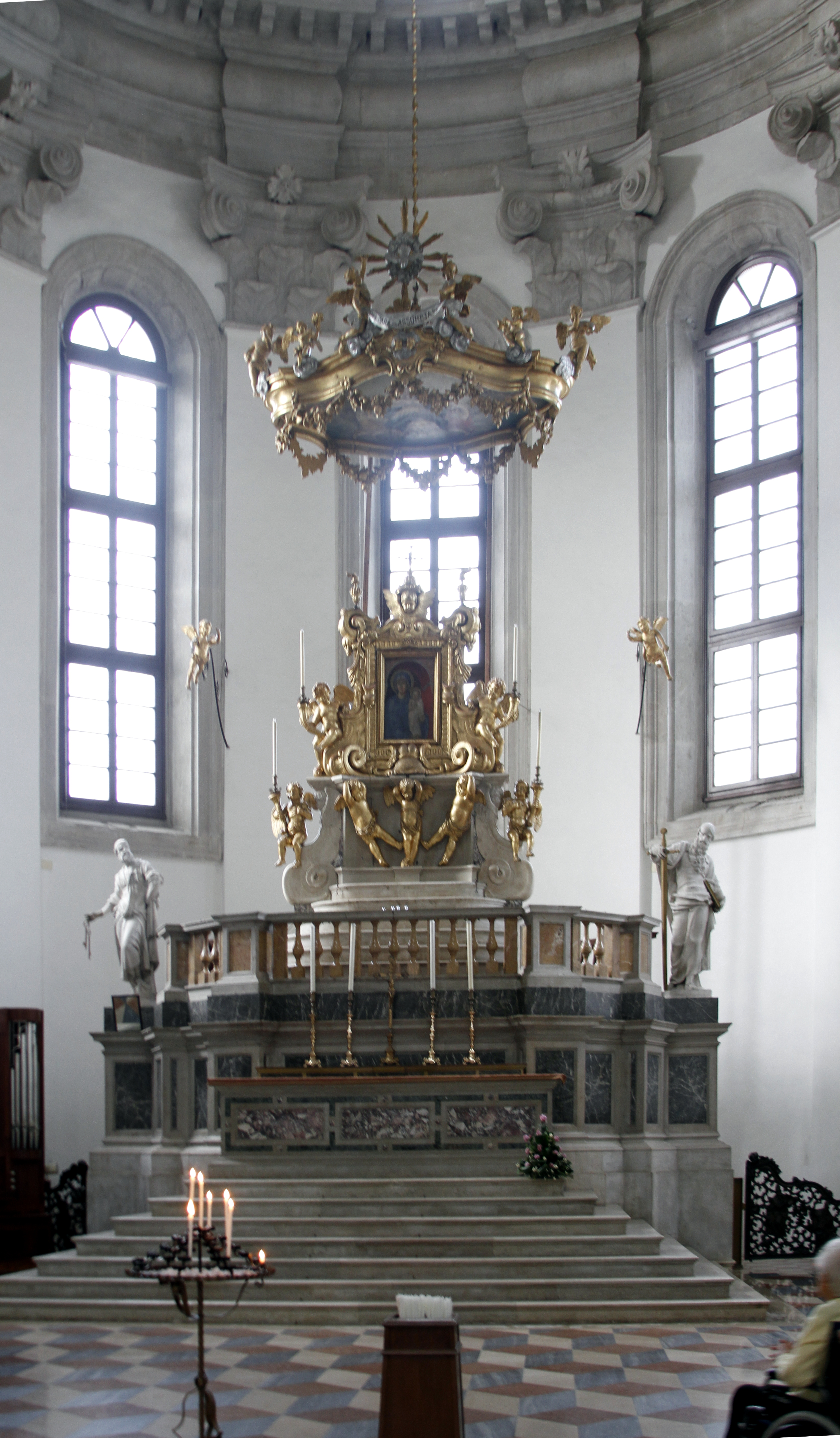 Duomo - Padua